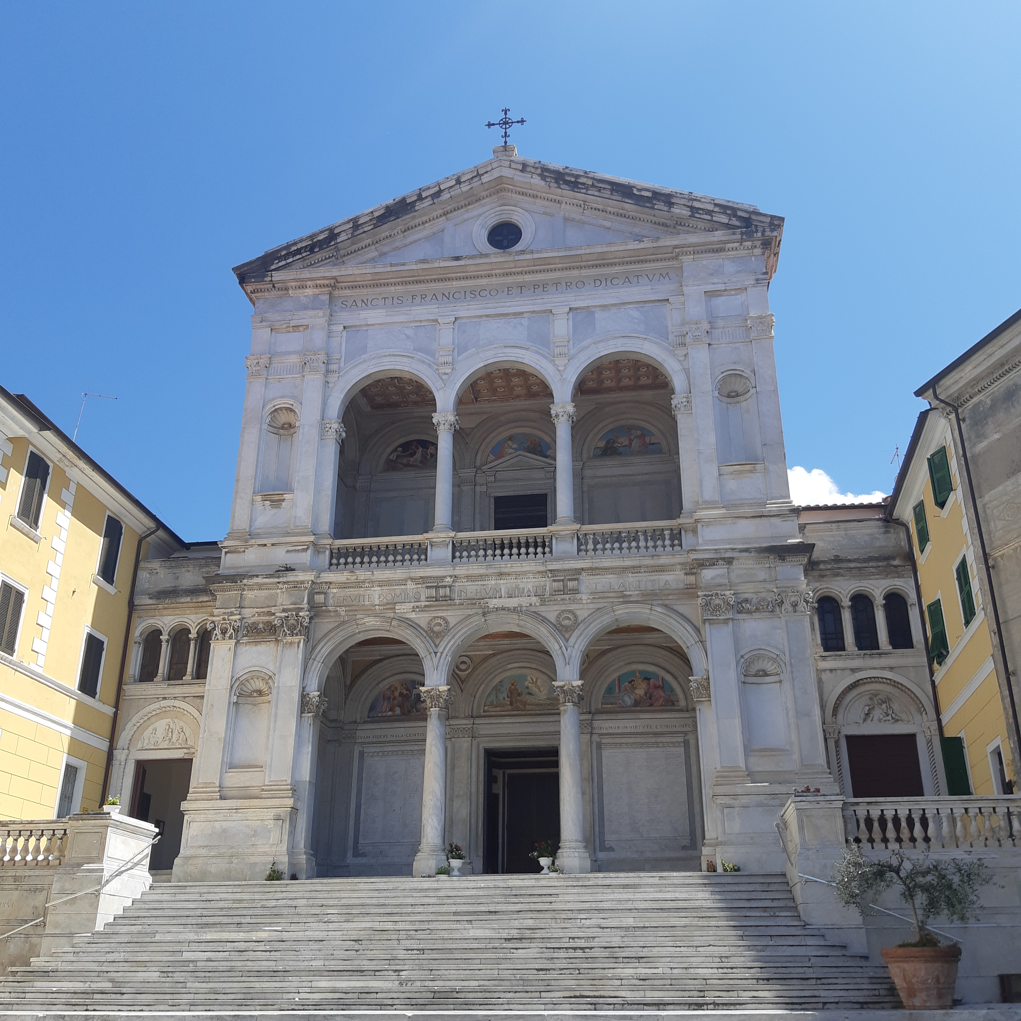 Questa foto mostra la faccita esterna della Basilica Cattedrale di San Pietro Apostolo e San Francesco d'Assisi